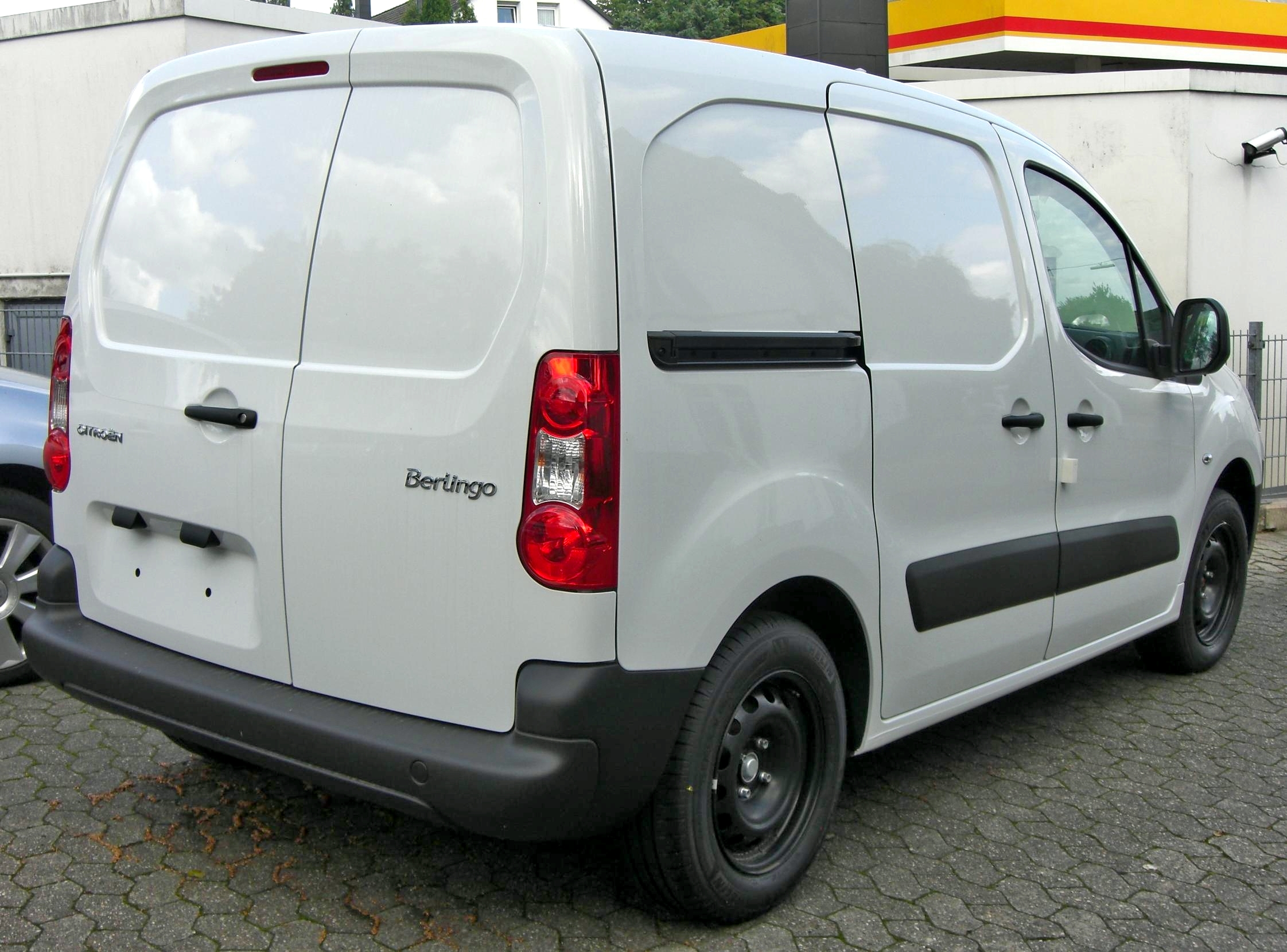 Citroën Berlingo II Kastenwagen